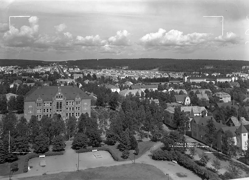 Utsikt övert Umeå.; Miljöer; Stadsmiljö